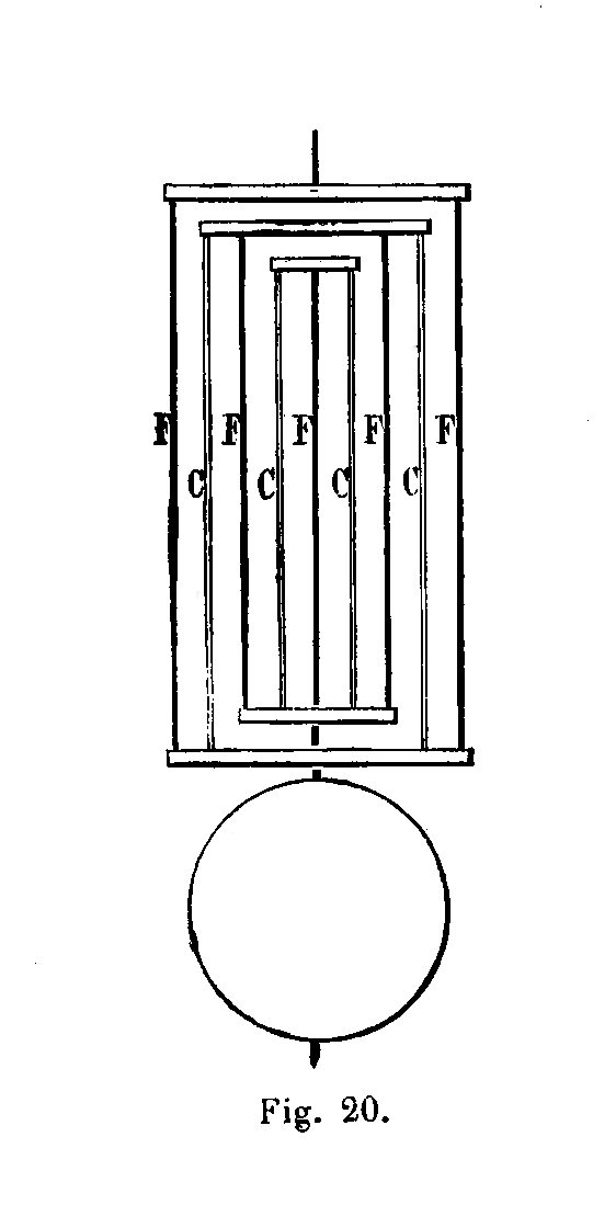 Slinger regulator.